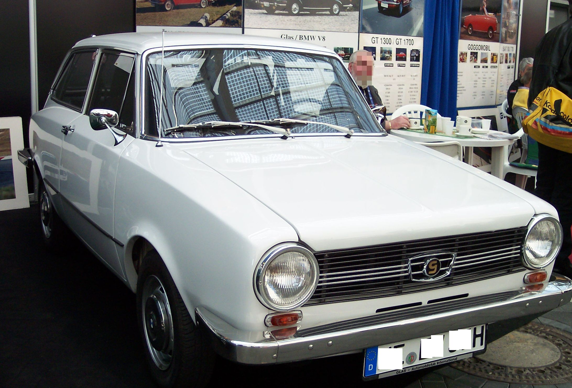 Glas 04 CL Kombi